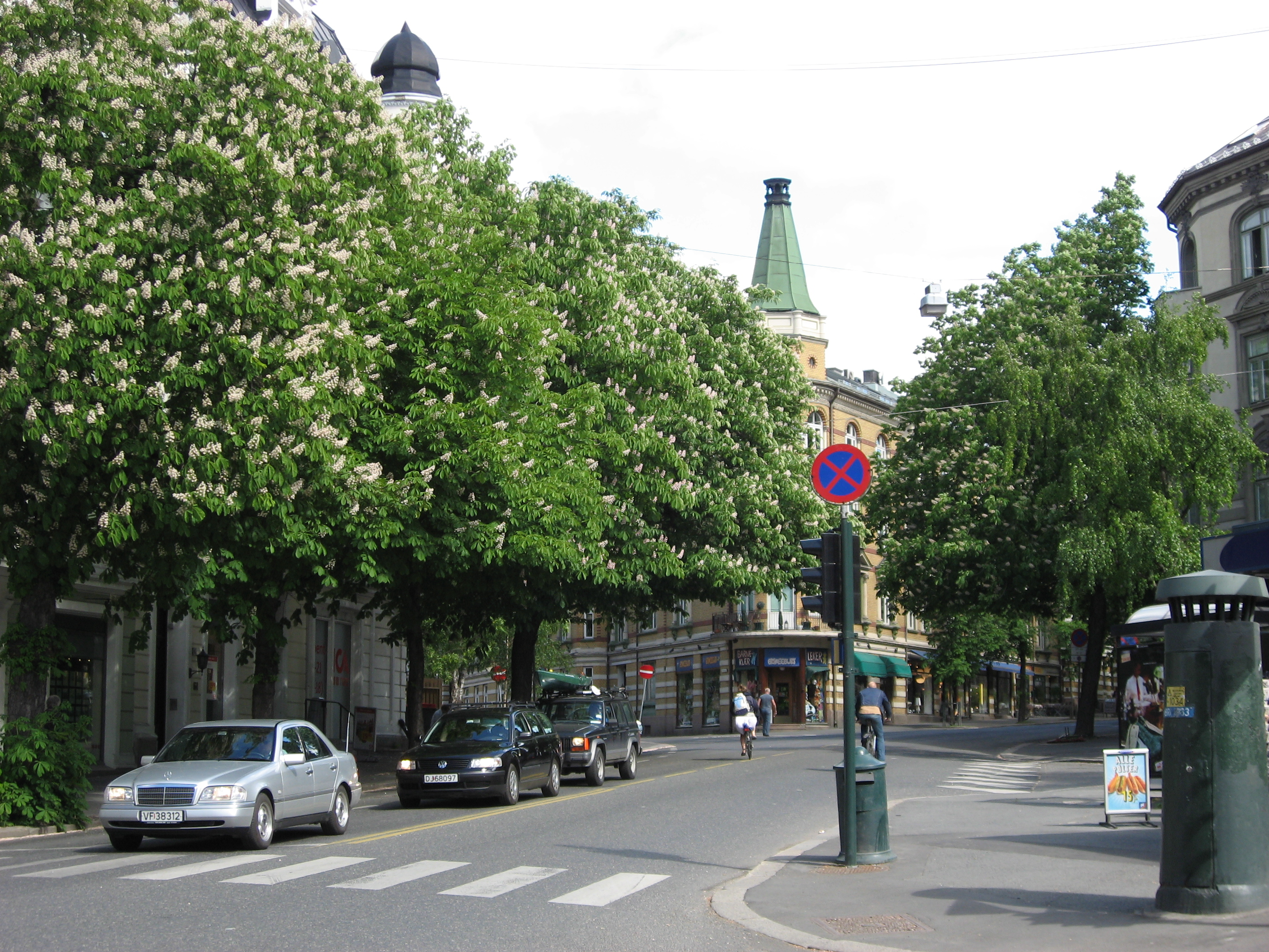 Bygdø Alle, Street in Oslo, Norway